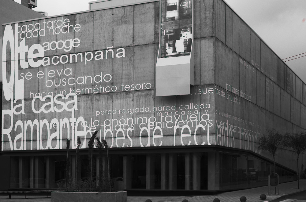 Biblioteca Pública Municipal en San Vicente del Raspeig.